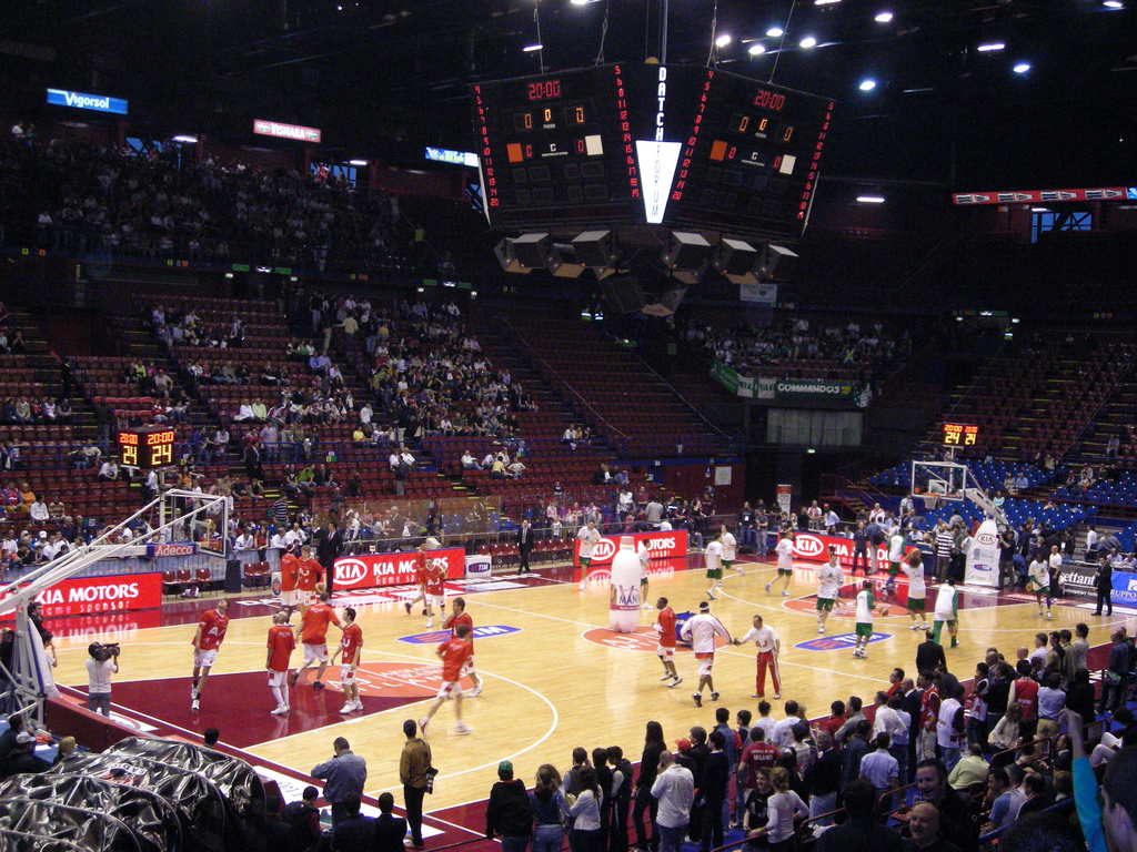 Gara 2 delle semifinali di LegaA stagione 2007/08 ARMANI J. MILANO - MONTEPASCHI SIENA 69-82